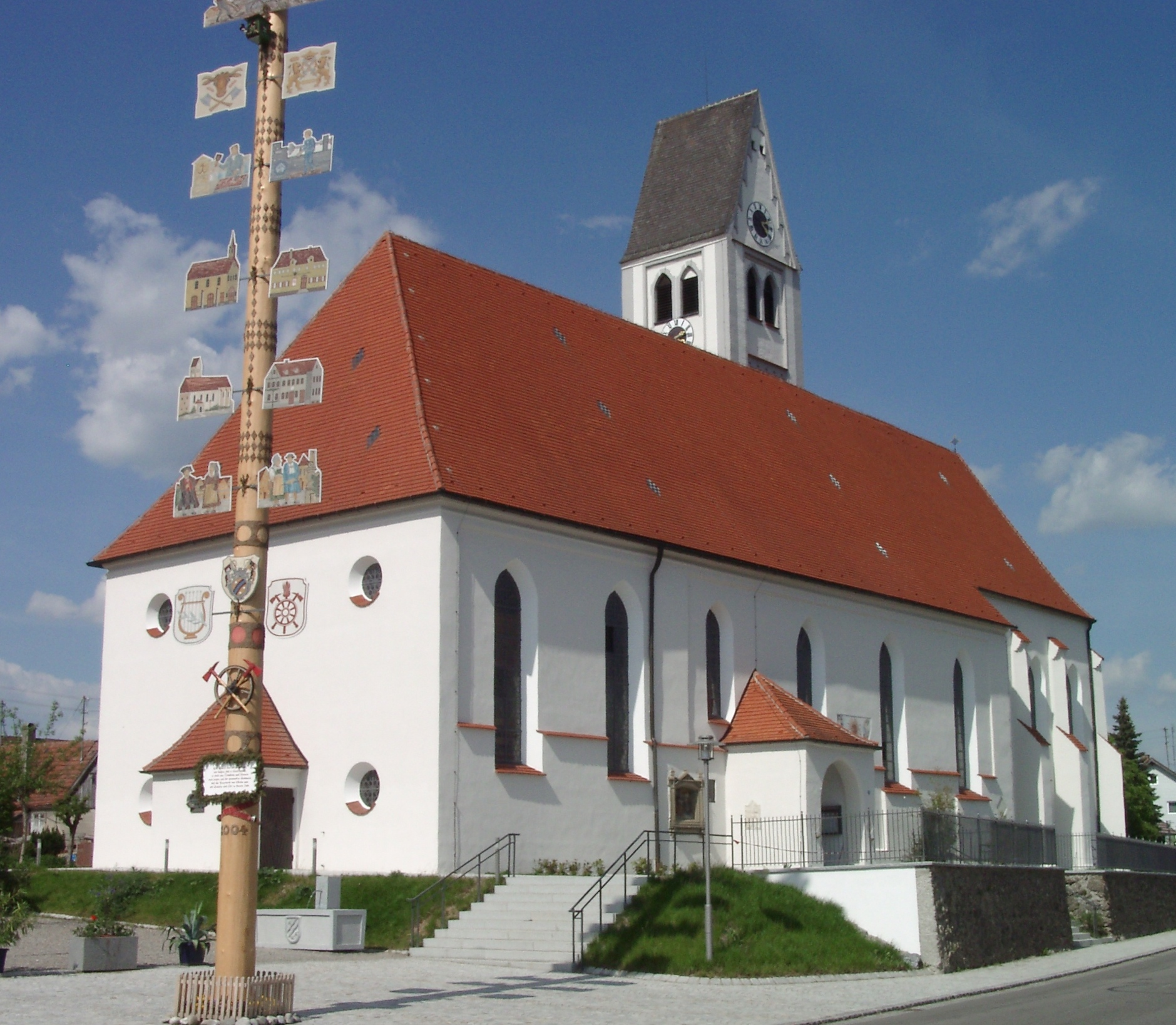 Markt Rettenbach (Bezirk Schwaben, Bayern) Jakobskirche mit Maibaum